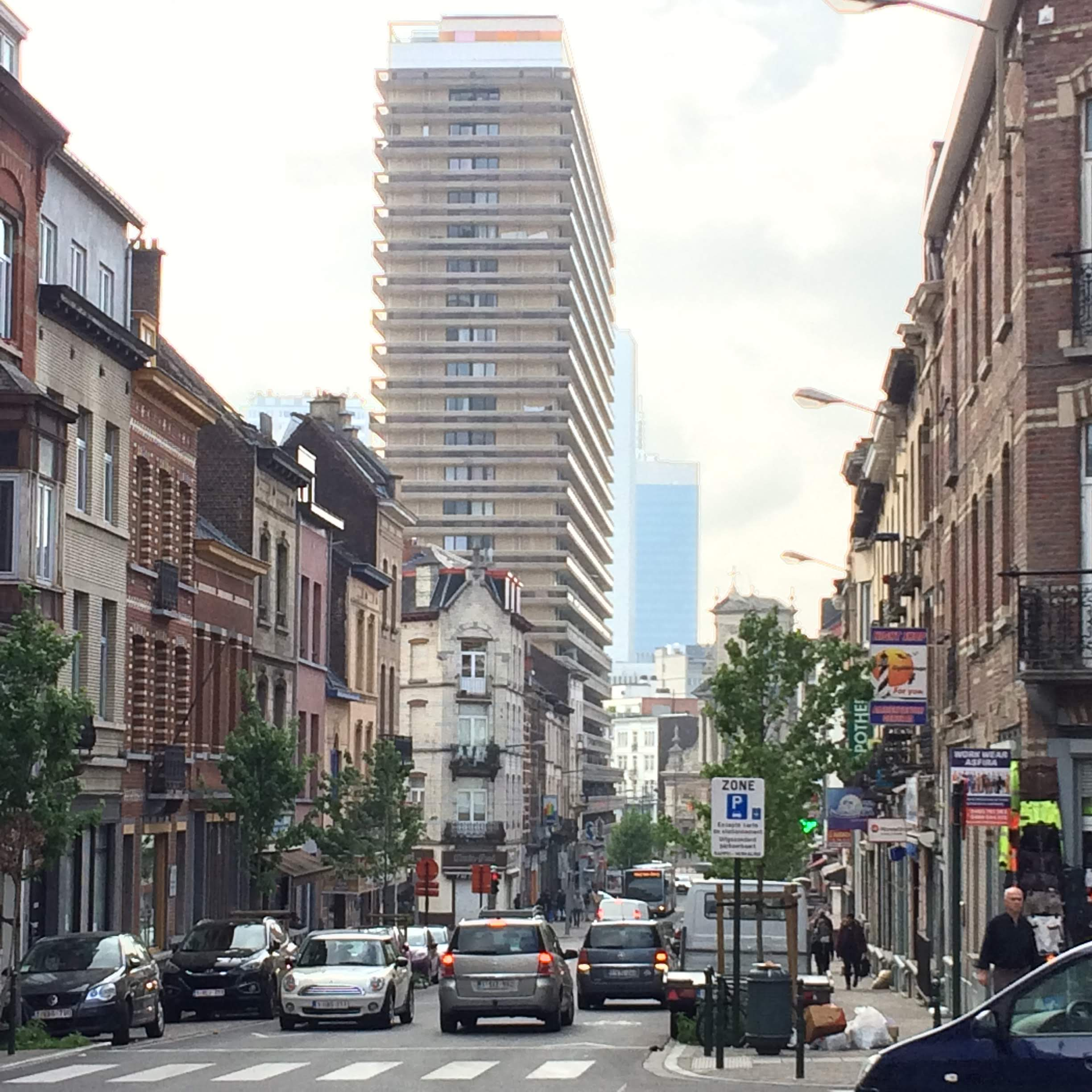 La résidence Pacific vue de la rue des Eburons